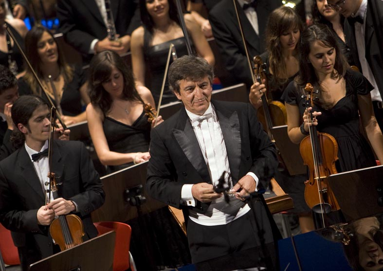 Manuel Galduf con la Jove Orquestra de la Generalitat Valenciana, julio 2008.